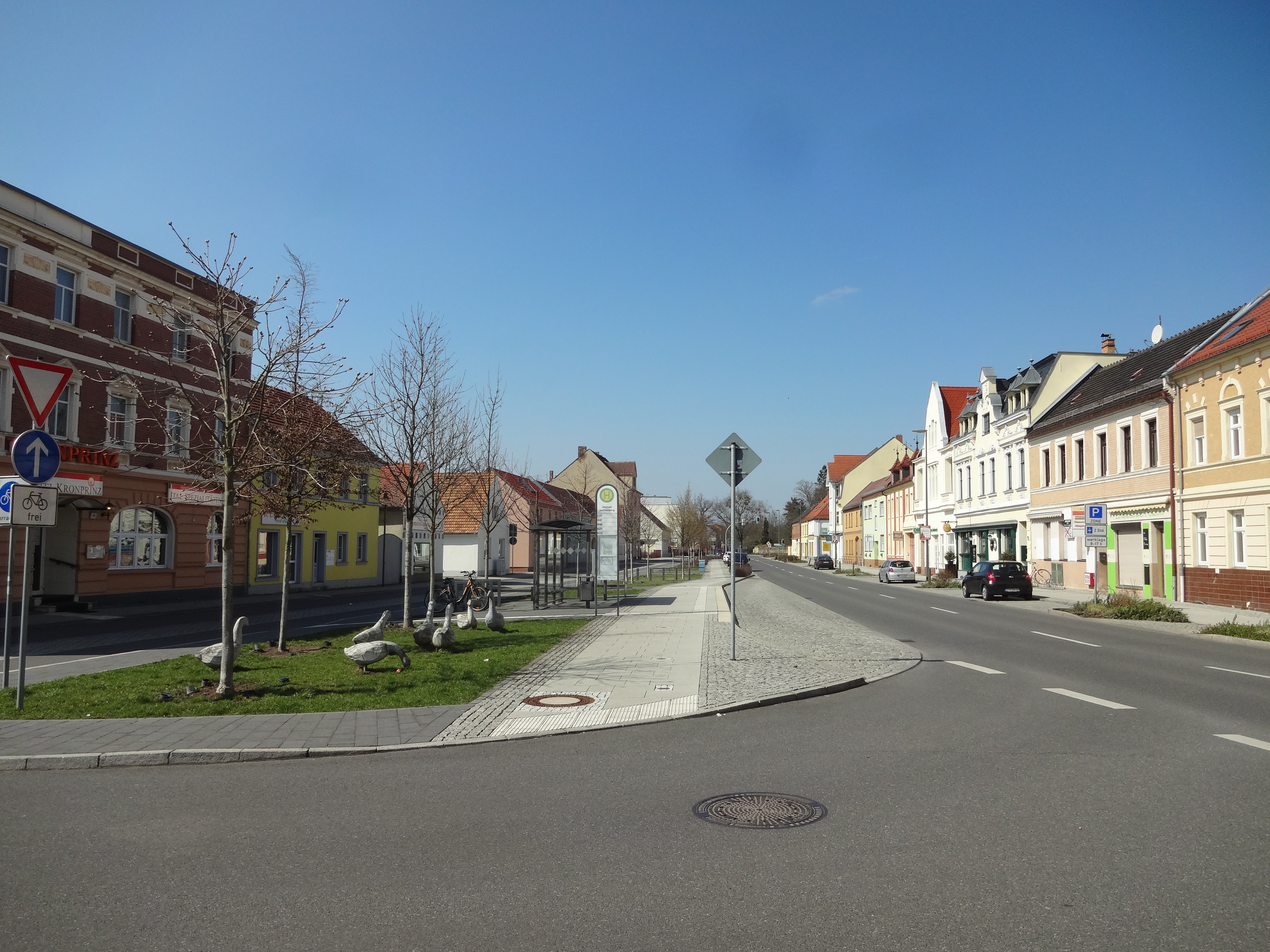 Blick in die Ernst-Thälmann-Straße in Senftenberg (Jüttendorfer Anger) (stadtauswärts)